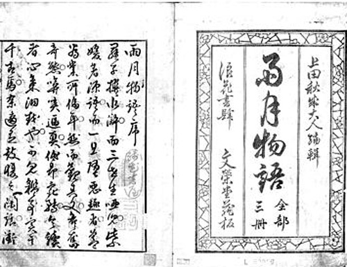 雨月物語見返、序文